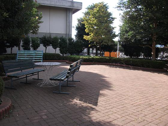 学校内：ベンチ